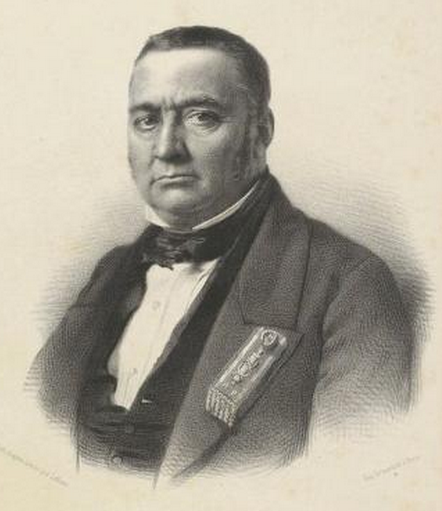 Charles Gilbert Tourret, né le 22 décembre 1795 à Montmarault dans l'Allier et décédé le 17 mai 1858 à Montmarault, était un homme politique français.